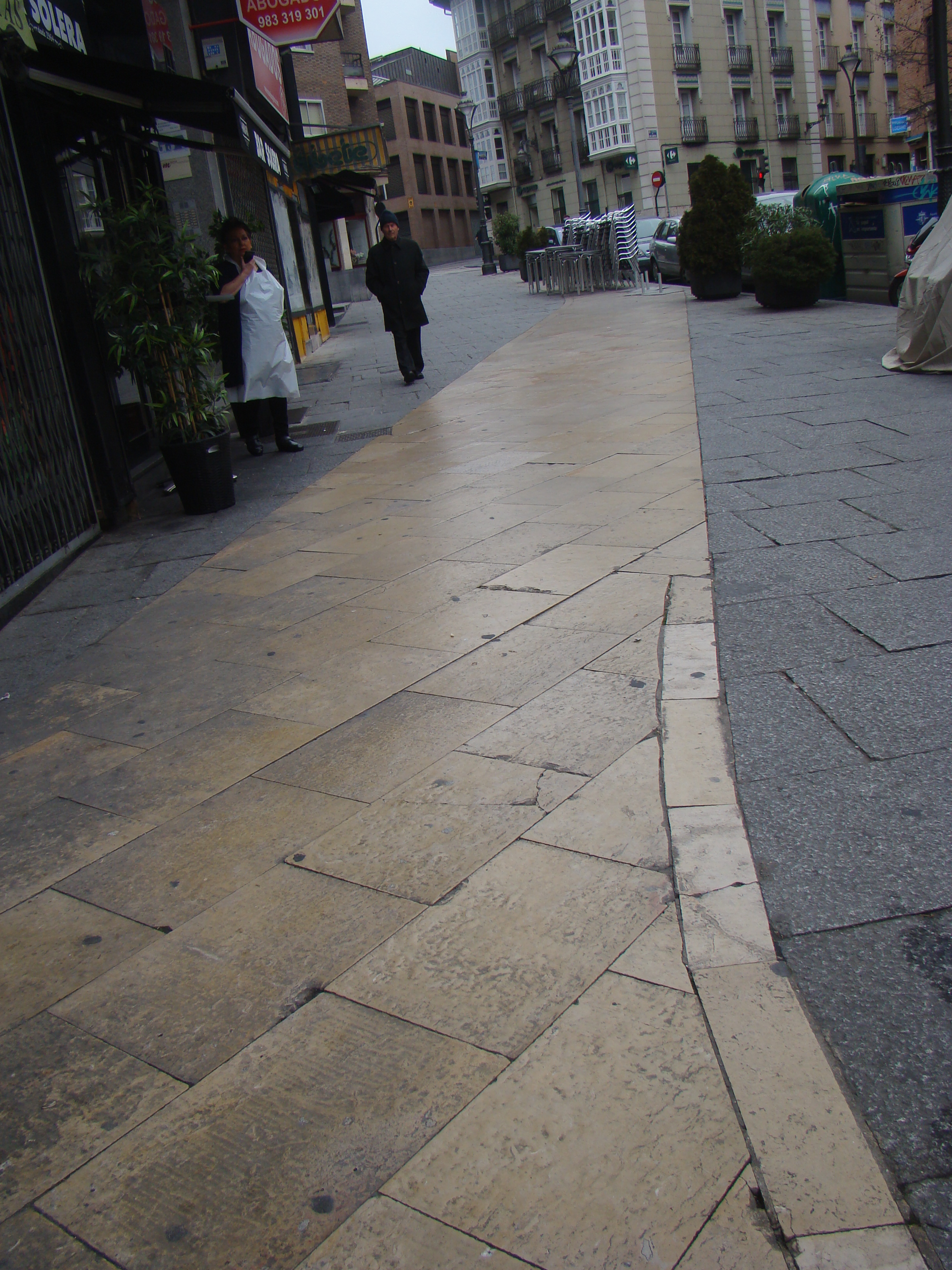 Valladolid, España. Vestigios de la muralla del siglo XII-XIII en la calle de las Angustias entre la calle del Bao y la que va a la plaza del Rosario.